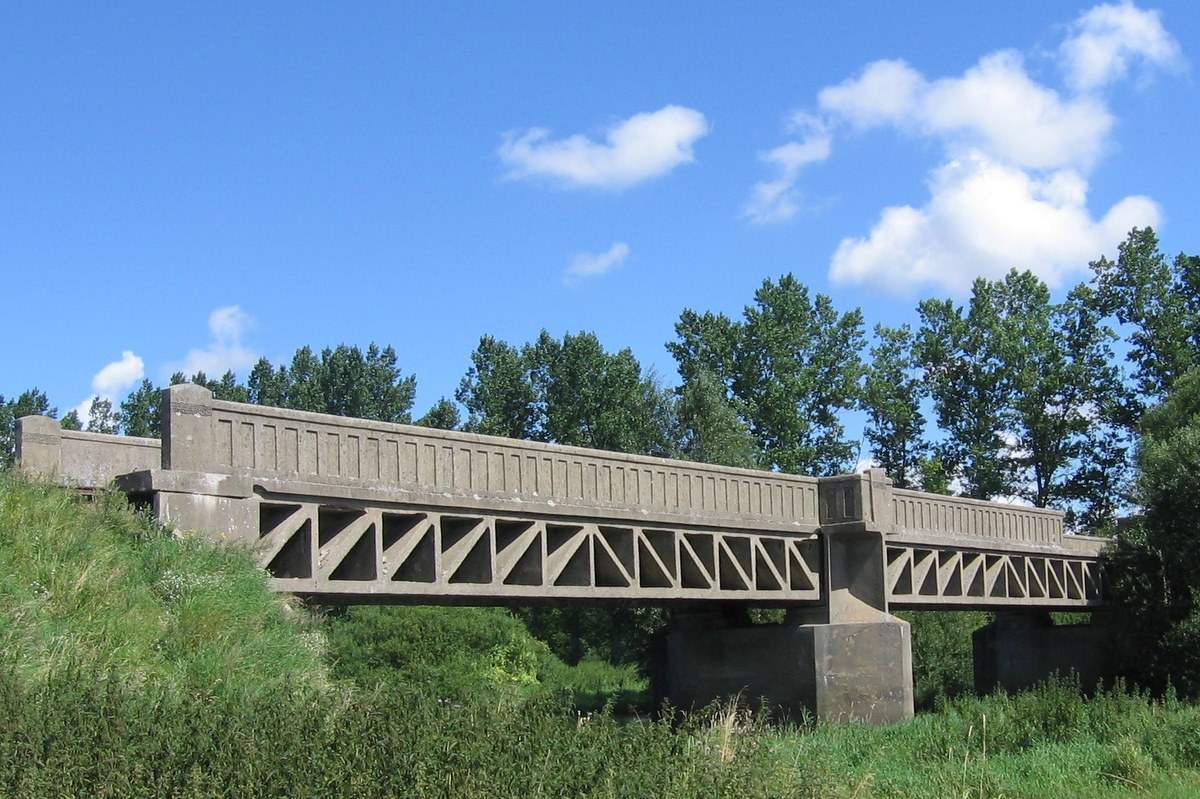 Nieczynny most kolei wąskotorowej nad rzeką Rega, pod wsią Nowielice, zachodniopomorskie